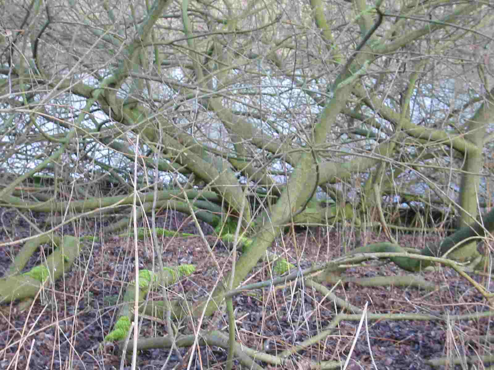 Eigen foto